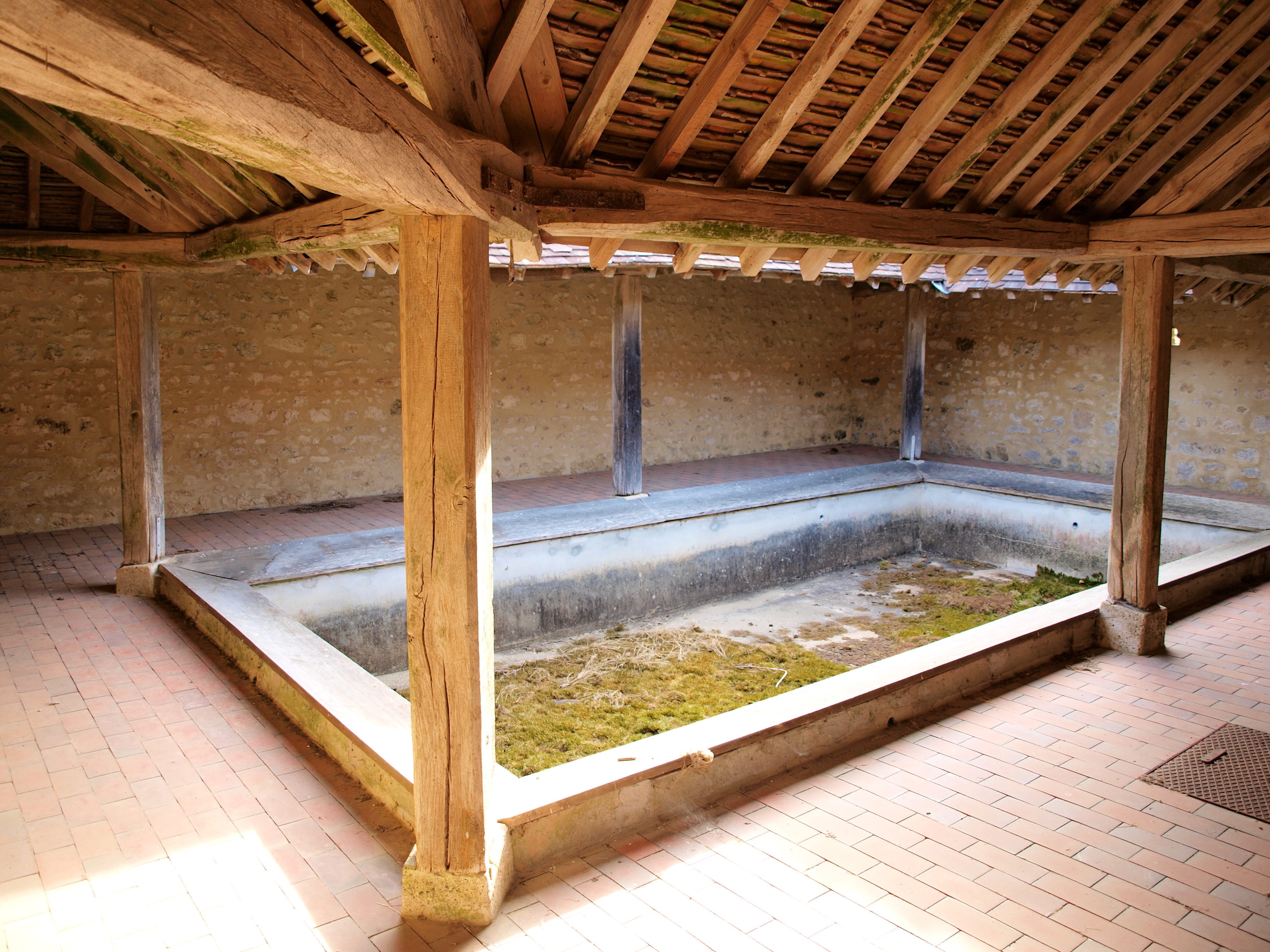 Lavoir de Vaux-sur-Lunain (Seine-et-Marne, France)